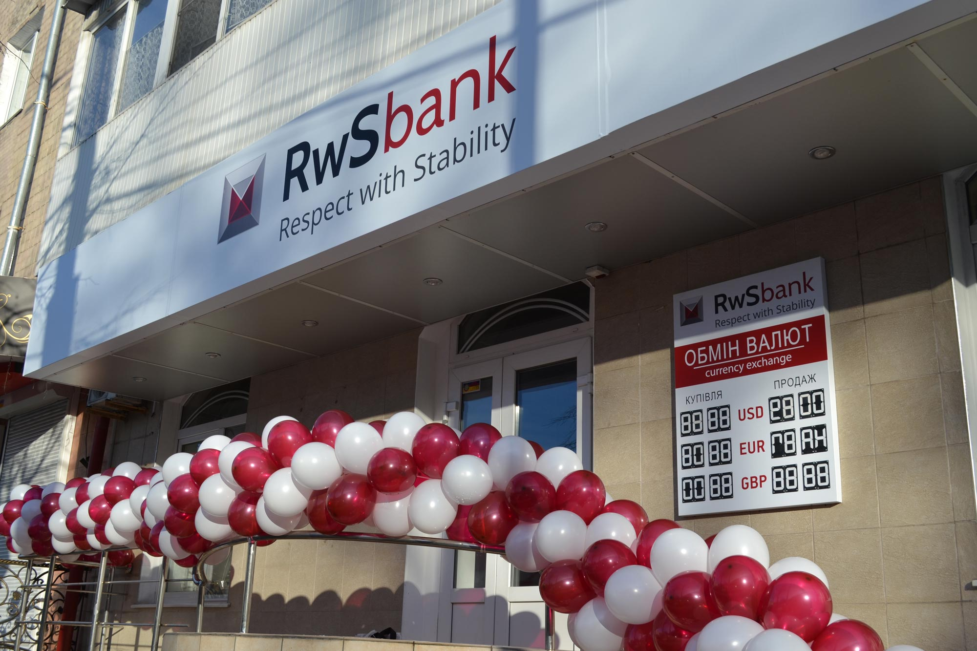 RwS bank. Відділення у Вінниці